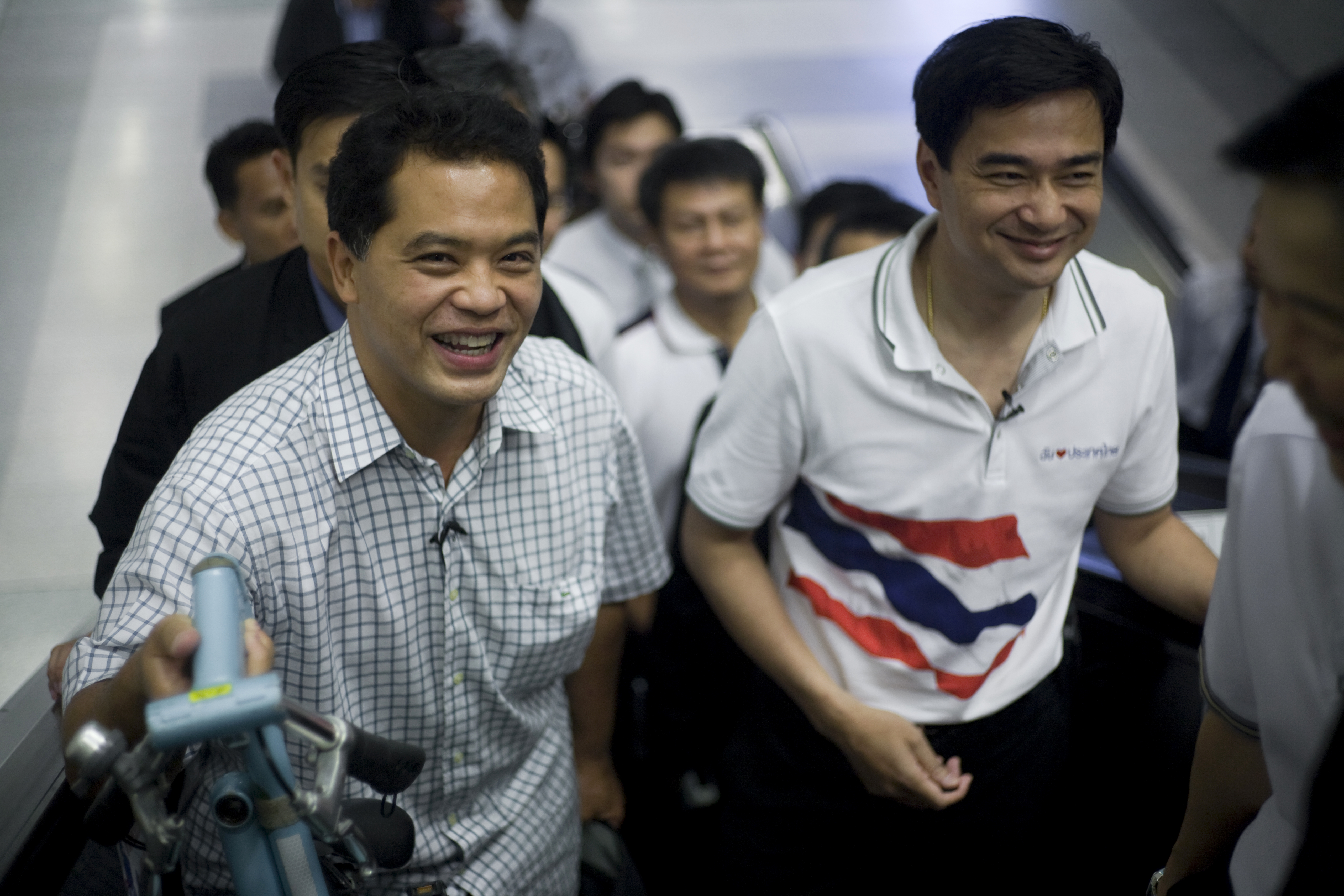 สุทธิพงศ์ ทัดพิทักษ์กุล (ฮาร์ท) / เชื่อมั่นประเทศไทยกับนายกอภิสิทธิ์ ณ ​สถานีรถไฟฟ้าใต้ดินพระรามเก้า 18 กรกฎาคม 2552 (The Royal Thai Government Photo by พีรพัฒน์ วิมลรังครัตน์)